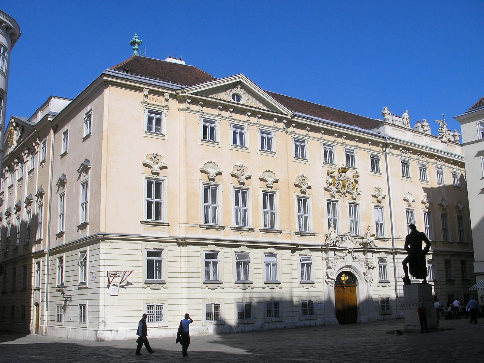 Böhmisch-Österreichische Hofkanzlei in Vienna, at Judenplatz.